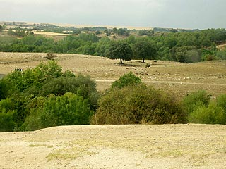 Paisaje típico de Peñalba de Ávila. Autor de la foto: Eugenio Vega [colaborador de Wikipedia] agosto de 2005. Libre de derechos.